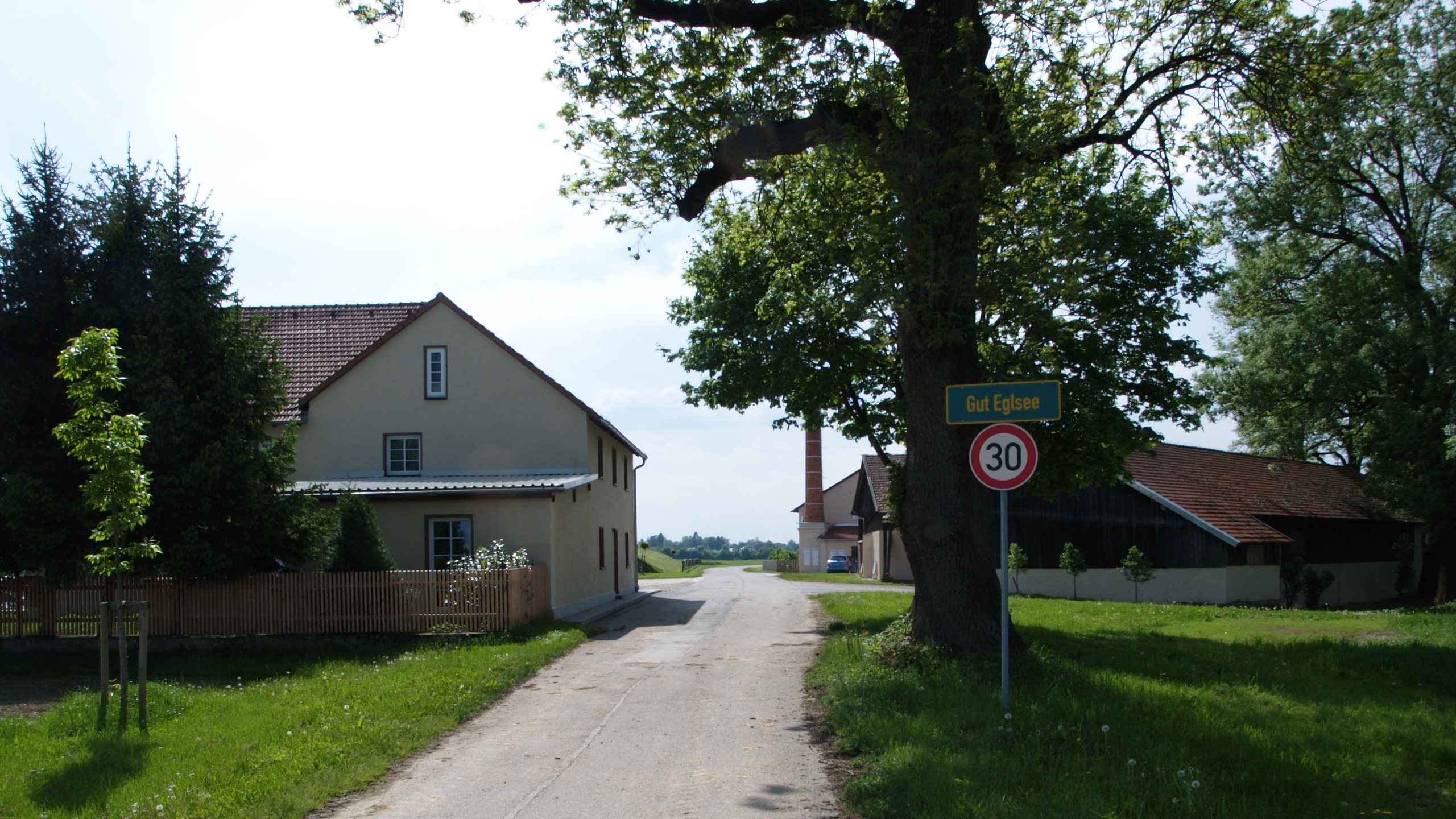 Eglsee (Straubing), Blick nach West; amtlicher Gemeindeteilname zum Zeitpunkt der Aufnahme ist Eglsee, die Beschriftung zeigt irreführenderweise Gut Eglsee